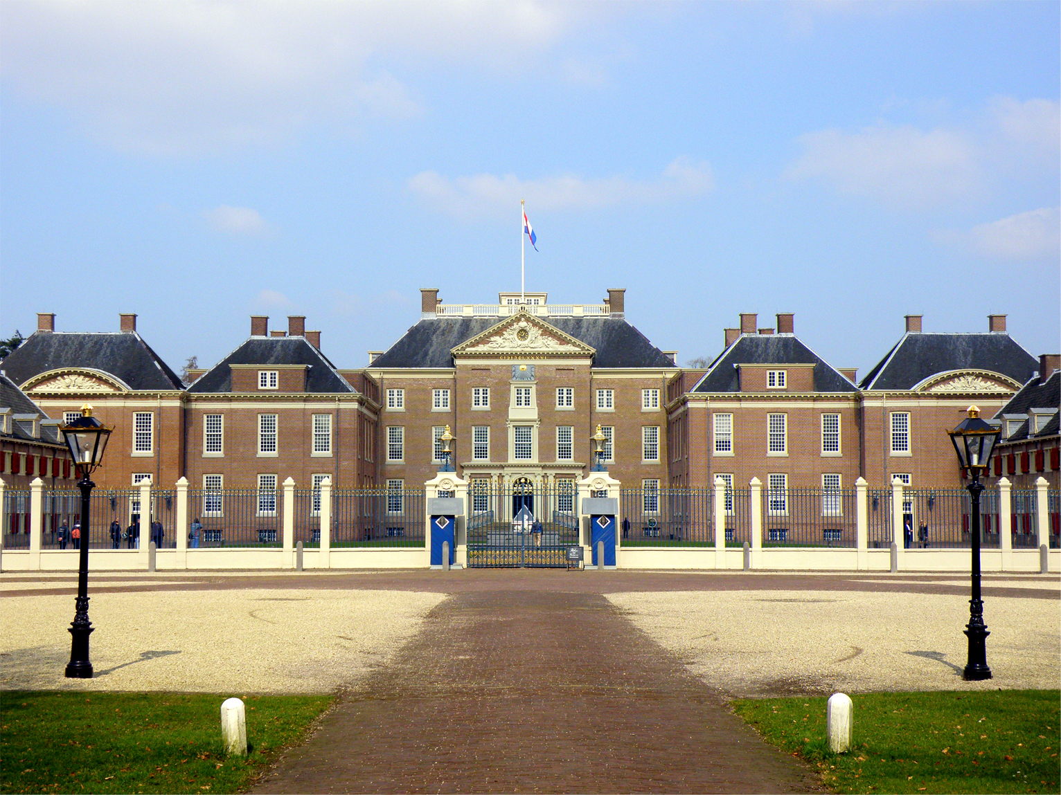 Royal palace "Het Loo"